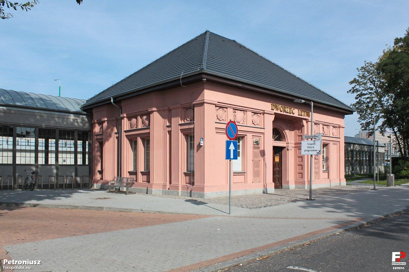 Dworzec Letni w Poznaniu.